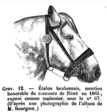 Tête d'un cheval boulonnais primé à Niort en 1865, dans l'ouvrage d'André Sanson, Applications de la zootechnie, 1867